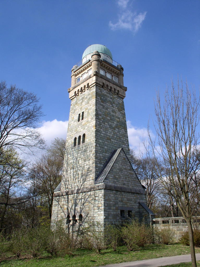 Der Bismarckturm in Remscheid